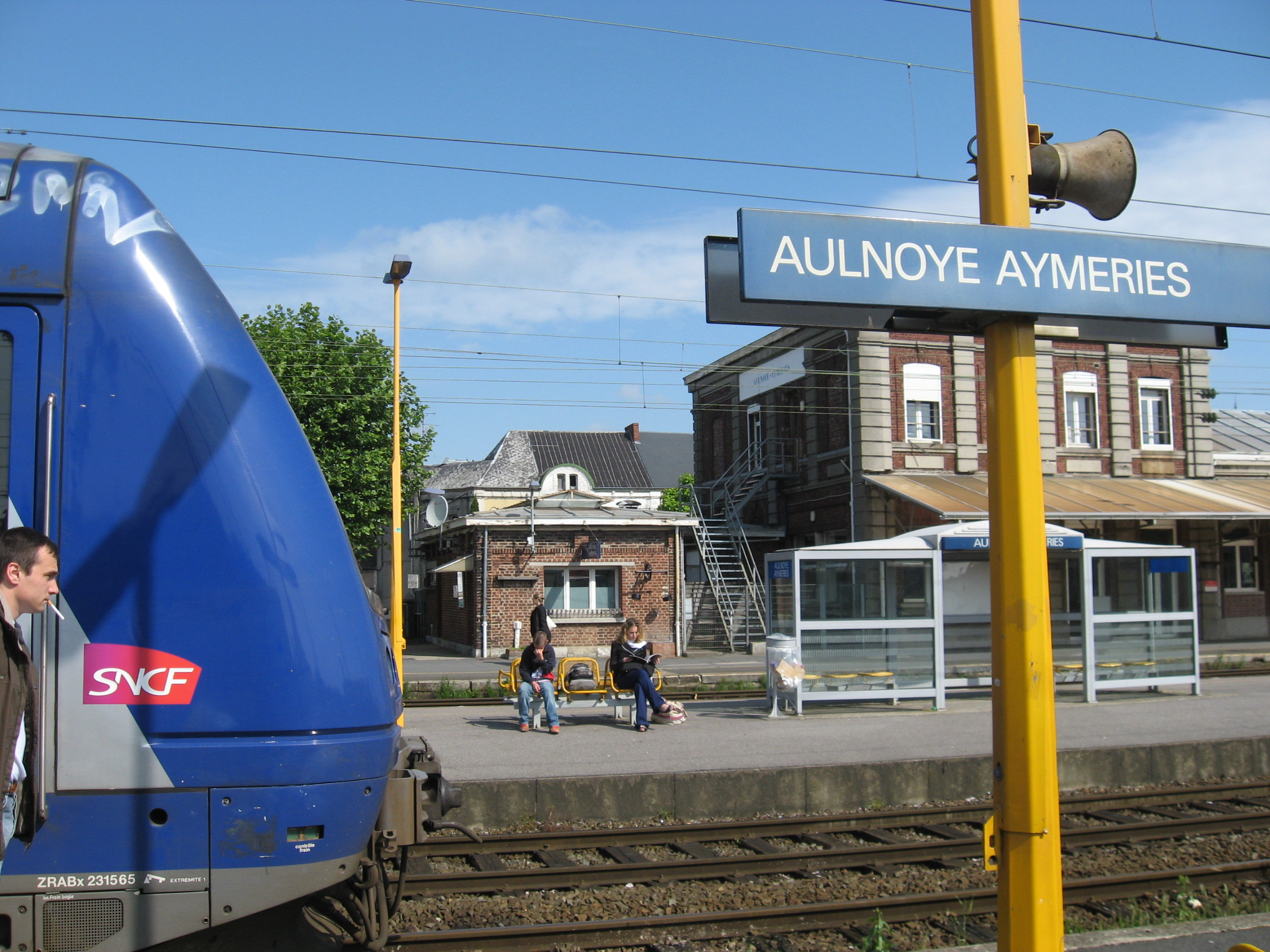 TER treinstel in Aulnoye-Ameries station